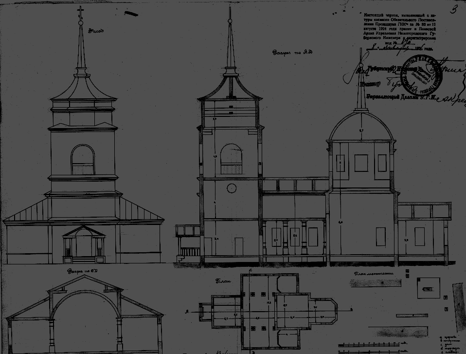 алексеевская церковь